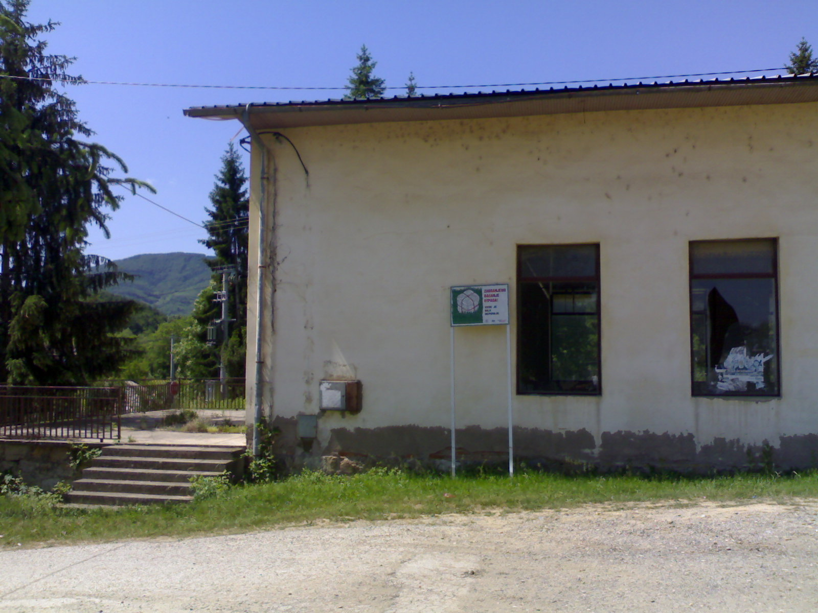 Дом културе у селу Десић код Шапца